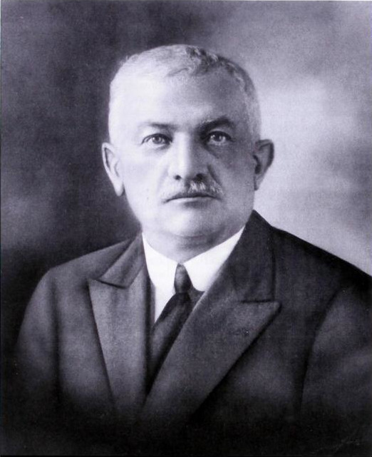 Fotografiá de Giovanni Buscaglione (1874-1941), de la Galería del Colegio Leon XIII. Bogotá.